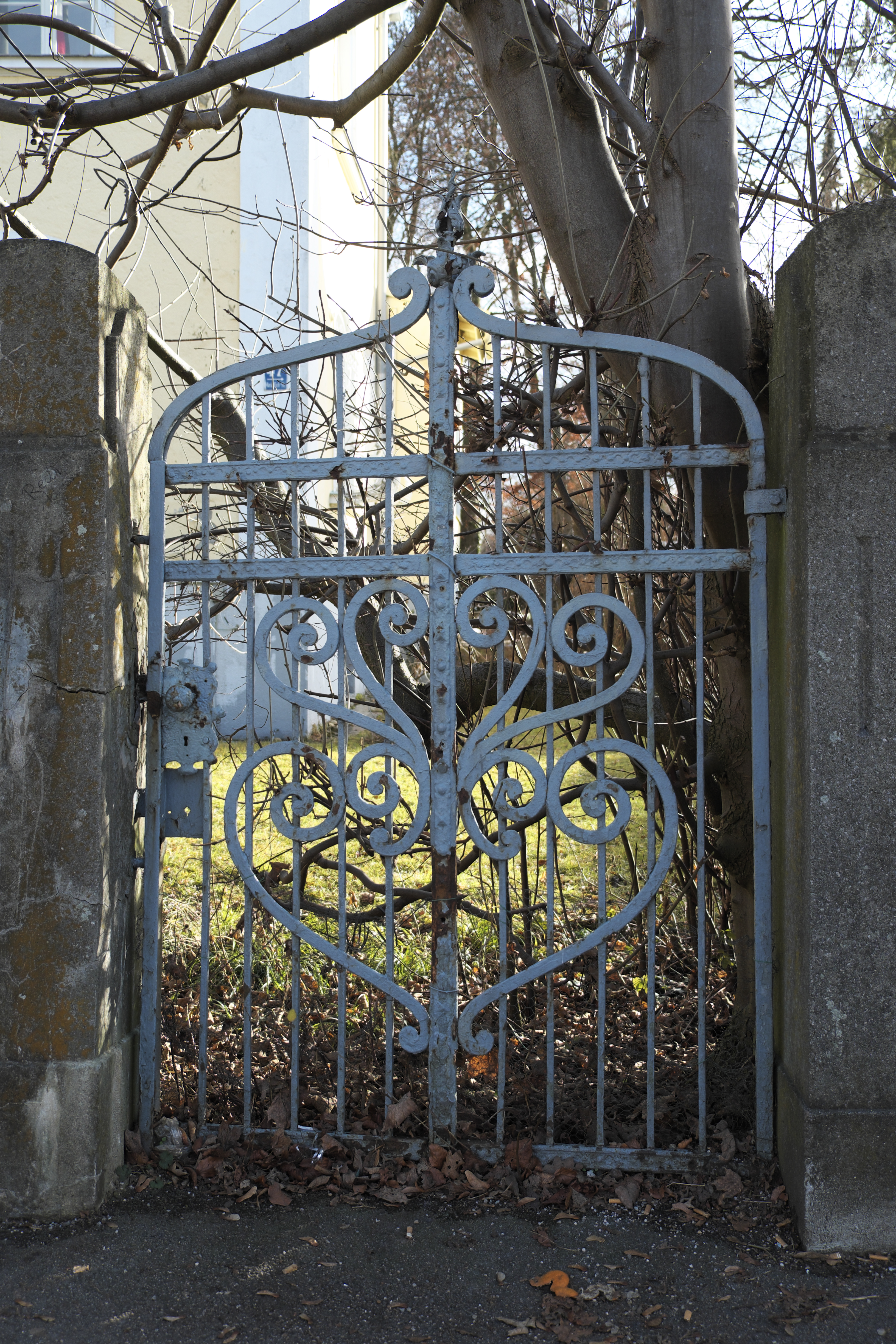 Villa in der Maria-Eich-Straße 47 in Pasing im Stadtbezirk Pasing-Obermenzing in München (Bayern/Deutschland), Gartentor